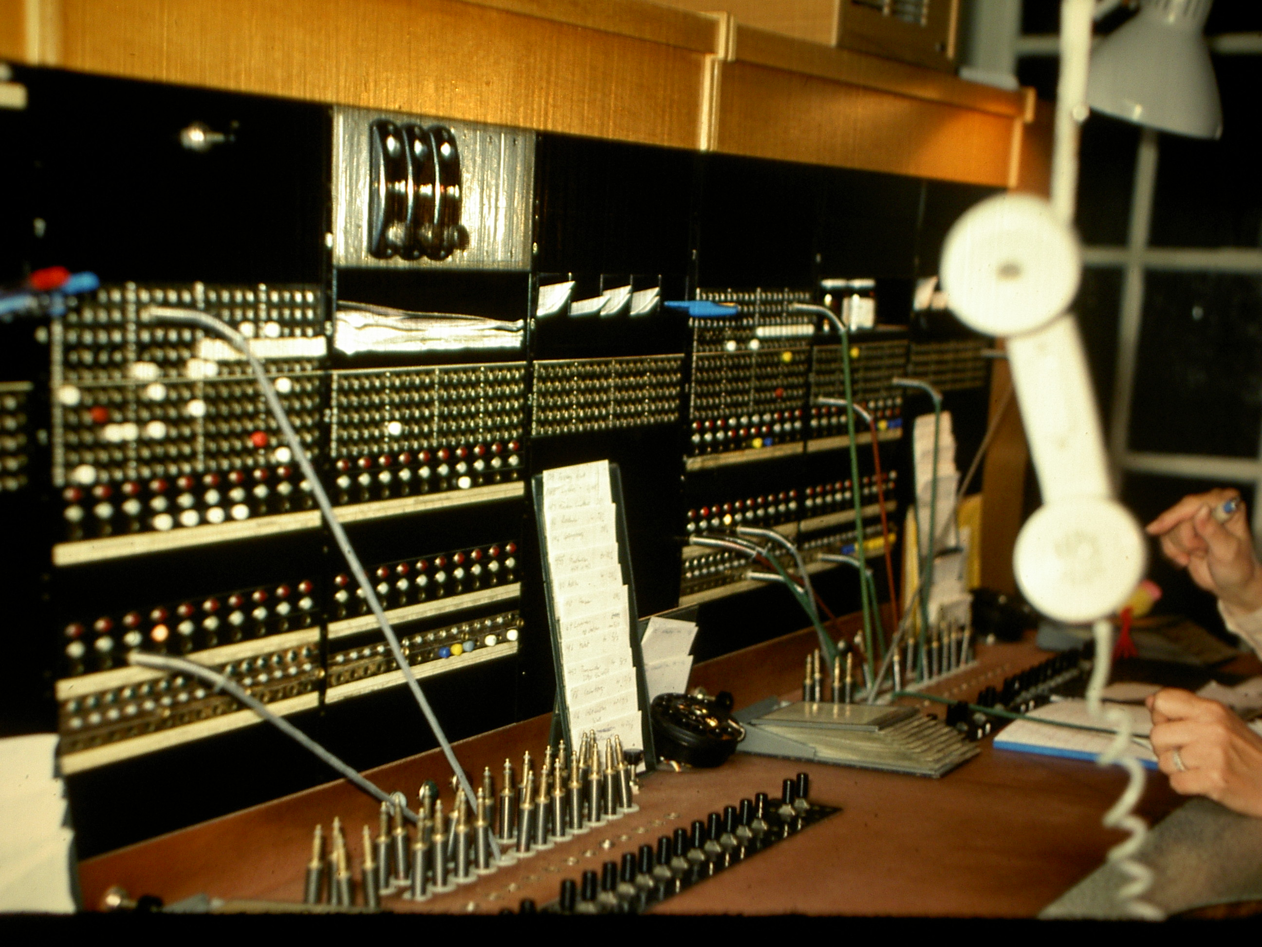 OS53-3pl